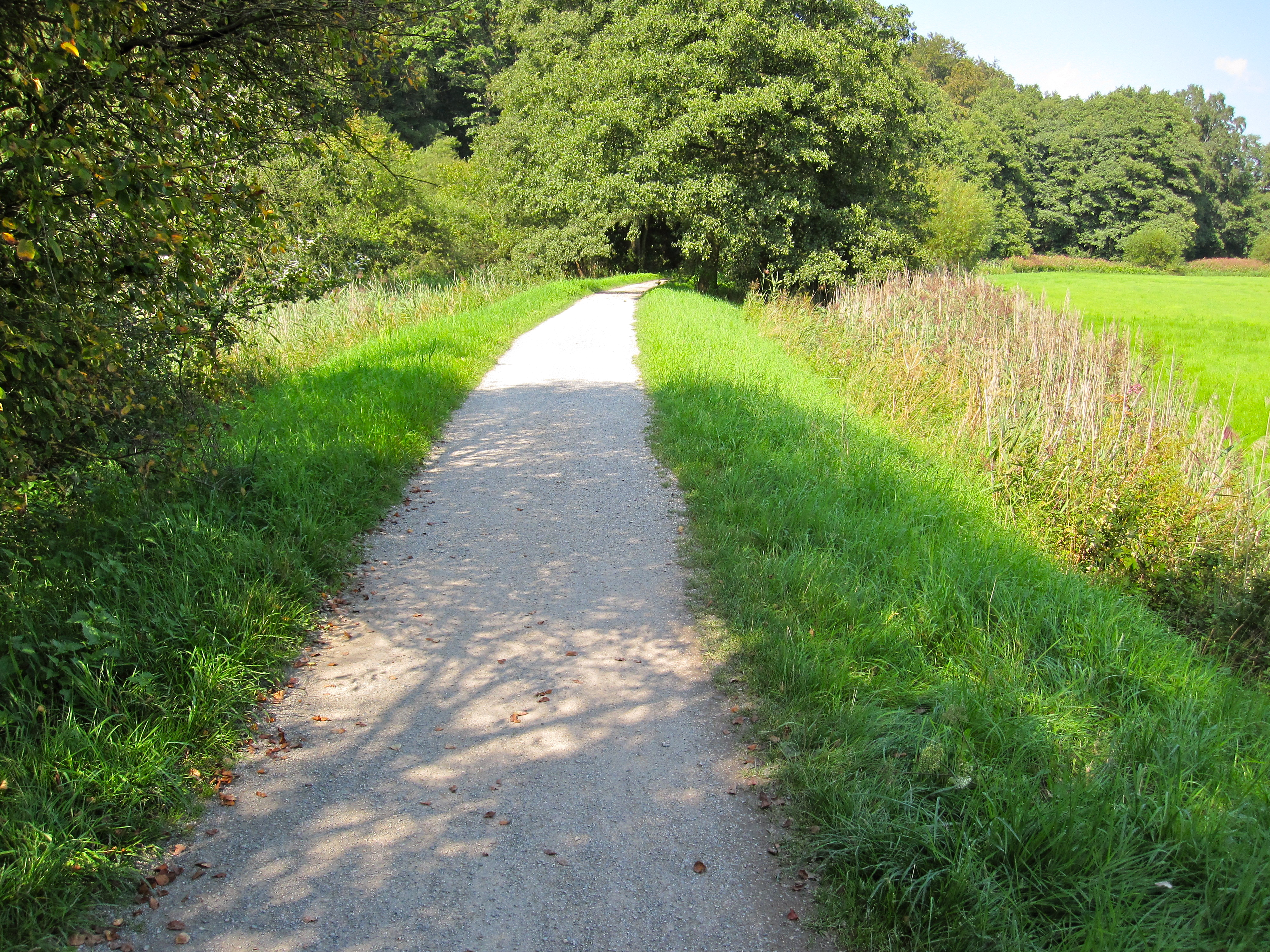 Ehemaliger Bahndamm der Herforder Kleinbahn zwischen Kurpark und Loose (Blickrichtung Loose) im Salzetal, heute ein Rad- und Wanderweg